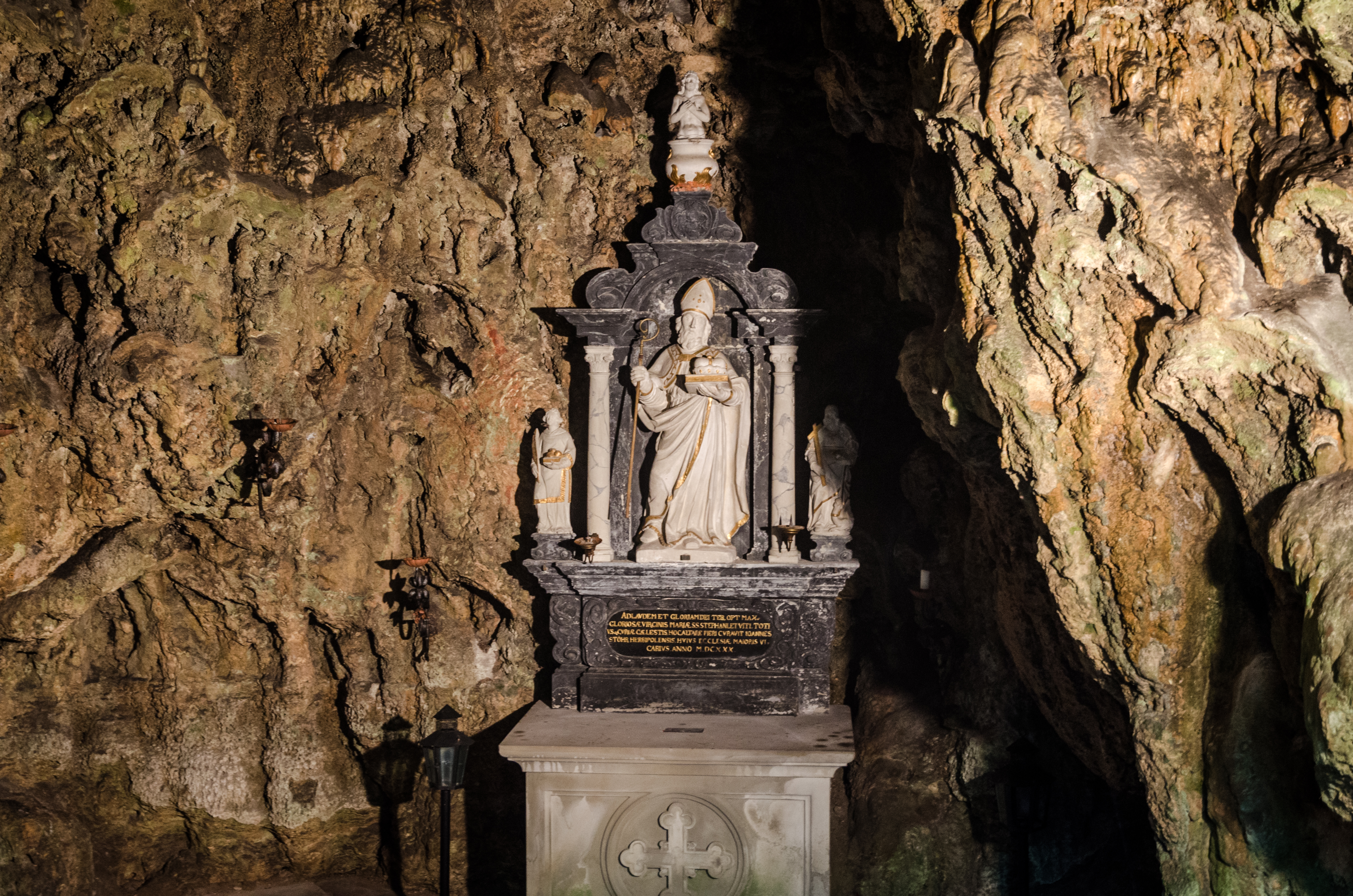 Homburg am Main, Burkhardusgrotte